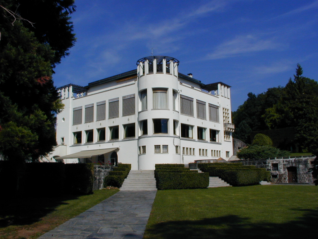 Villa Karma, Clarens Adolf Loos architecte